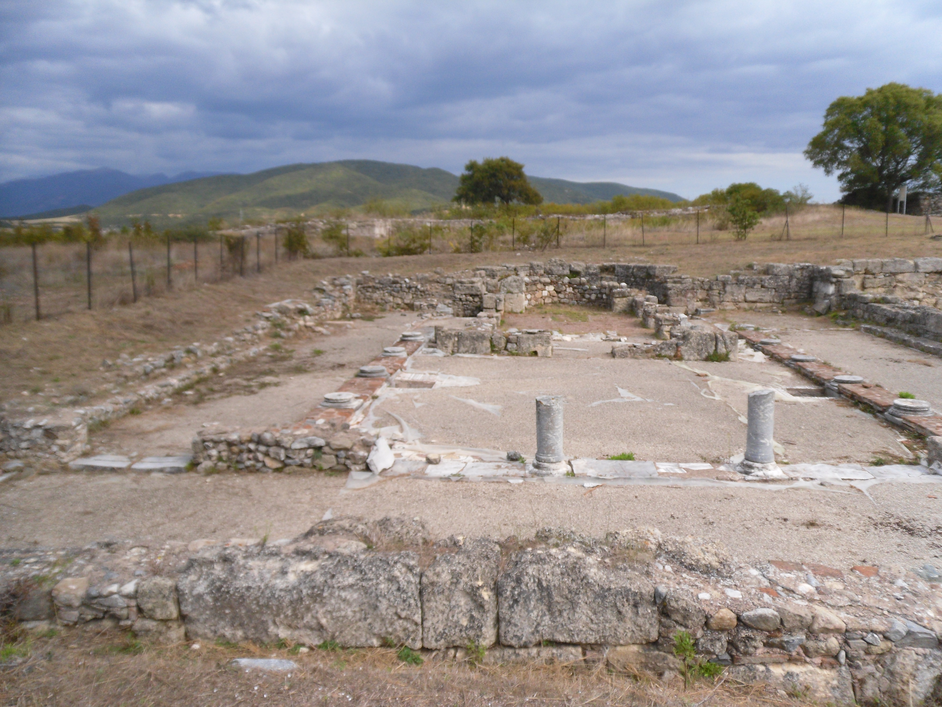 Τρίκλιτη δρομική βασιλική με μεγάλη αψίδα στα ανατολικά. Στα δυτικά αναπτύσσεται ισοπλατής νάρθηκας και στα νότια εκτείνεται μεγάλο αίθριο με στοές στη δυτική, νότια και βόρεια πλευρά. Χρονολογείται στο 2ο μισό του 5 αιώνα μ.Χ. Ψηφιδωτά δάπεδα καλύπτουν το ναό, το νάρθηκα, τη δυτική και τμήμα της νότιας στοάς του αιθρίου και το δωμάτιο στα νοτιοδυτικά του αιθρίου. Είναι συνδυαμός γεωμετρικών με ζωικά μοτίβα.«Παλαιοχριστιανική Αμφίπολις»